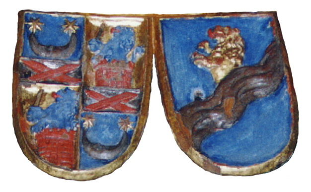 Pontus De la Gardie och Sofia Gyllenhielm. Anvapen i Teda kyrka.